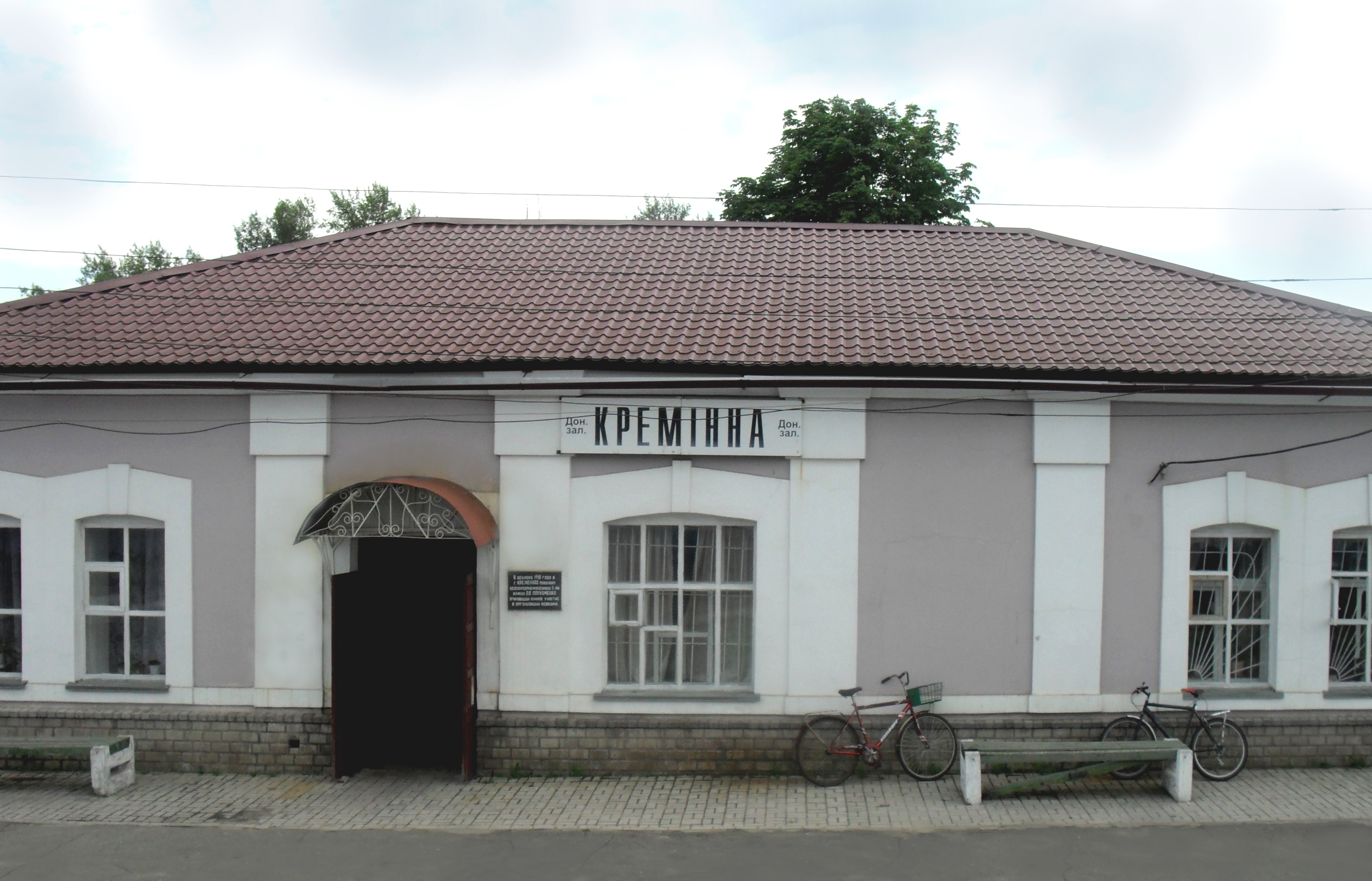 станція Кремінна